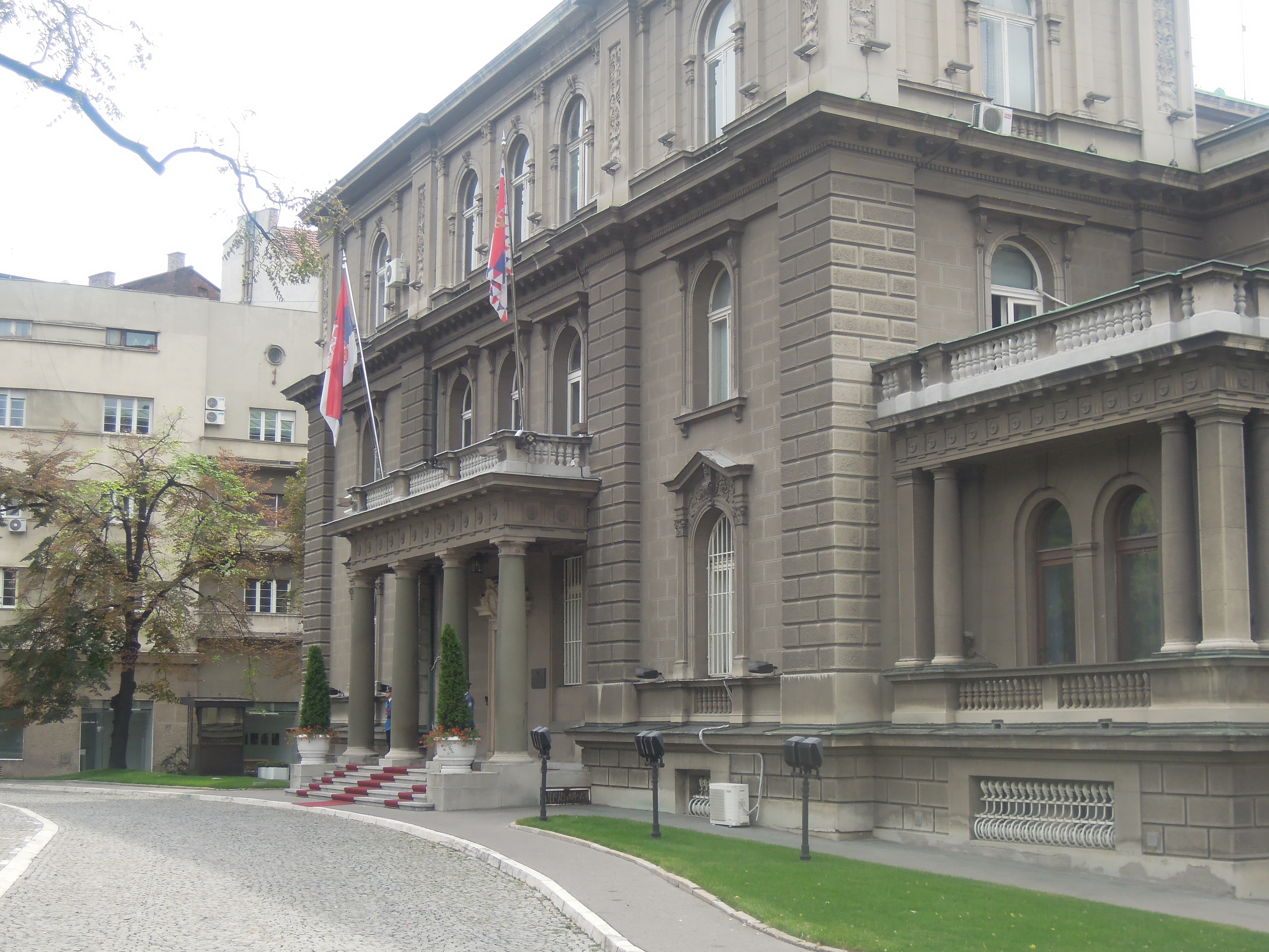 Zgrada Novog dvora u Beogradu.